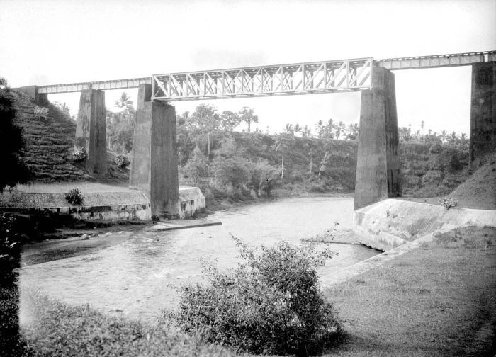 Negatief. Een brug over de rivier Lesti bij Dampit in Pasoeroean, Oost-Java